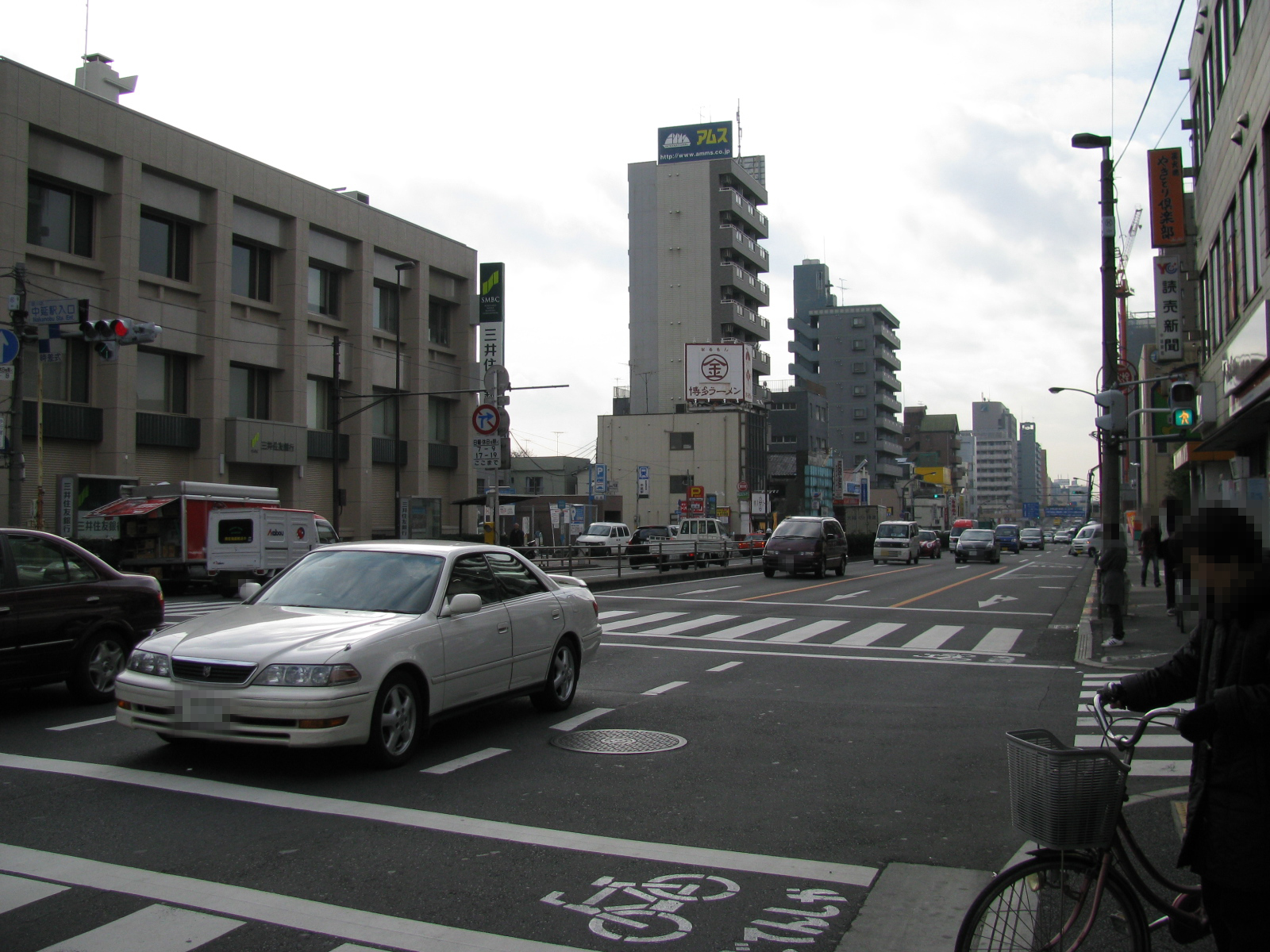 都営地下鉄浅草線中延駅駅前風景（国道1号線）